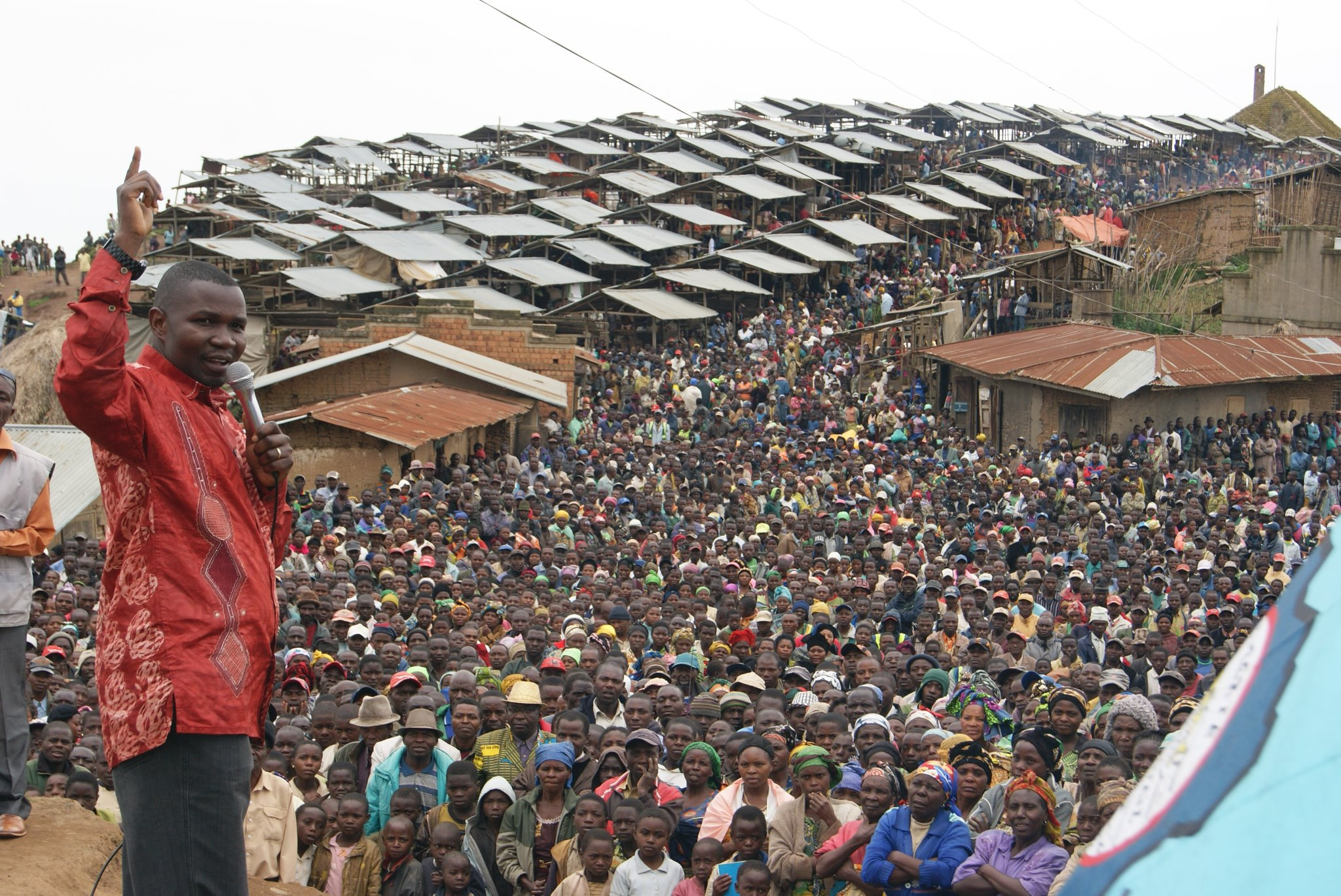 GOUVERNEUR Nord-Kivu,Opérateur PolitiqueRDC,Initiateur des projets de développement,défenseur attitré de la vision prospective et VICE-PRESIDENT MONDIAL de AIRF